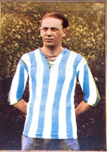 Ernesto Pieri in Racing Club.